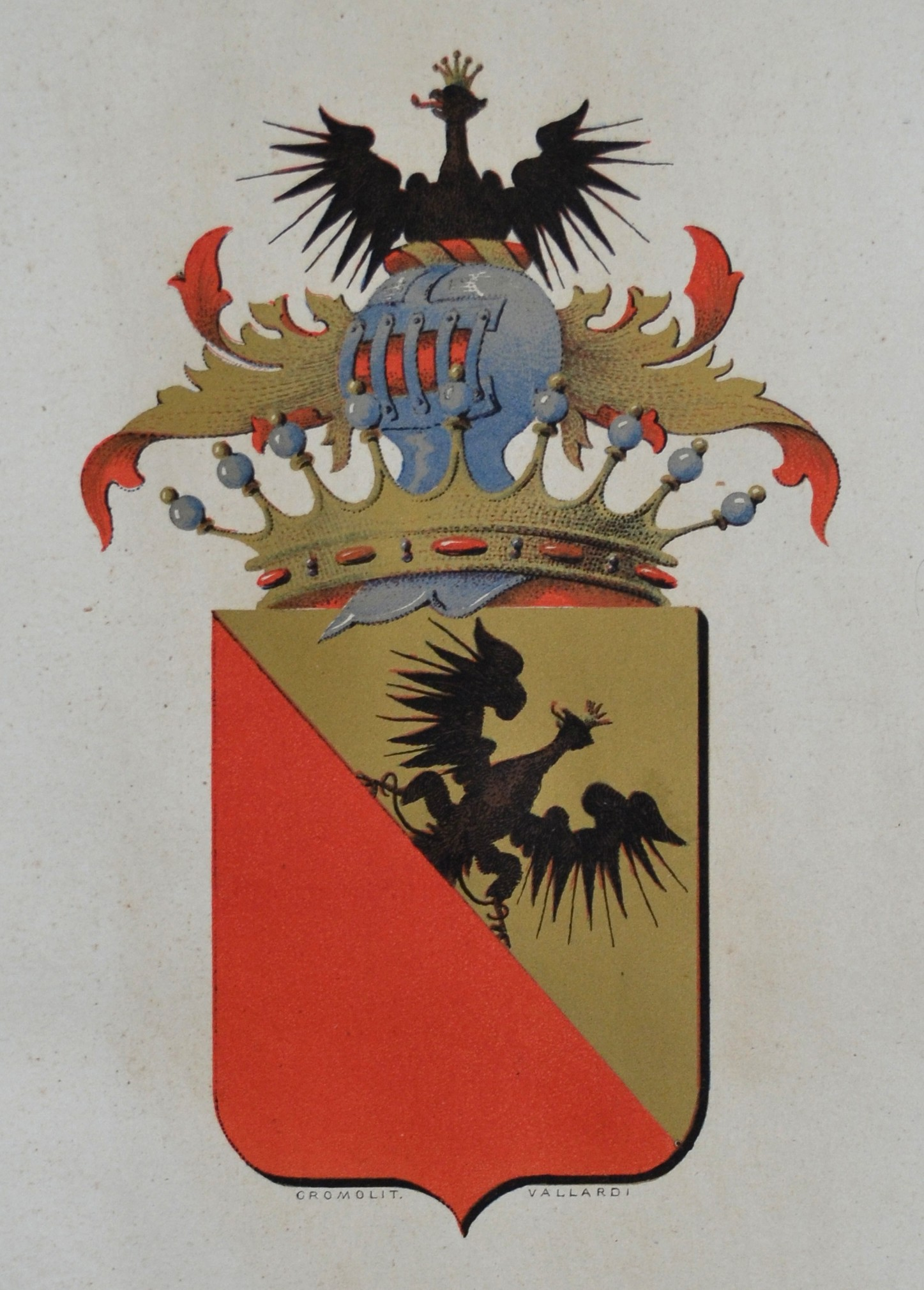 Antico stemma della famiglia Melzi